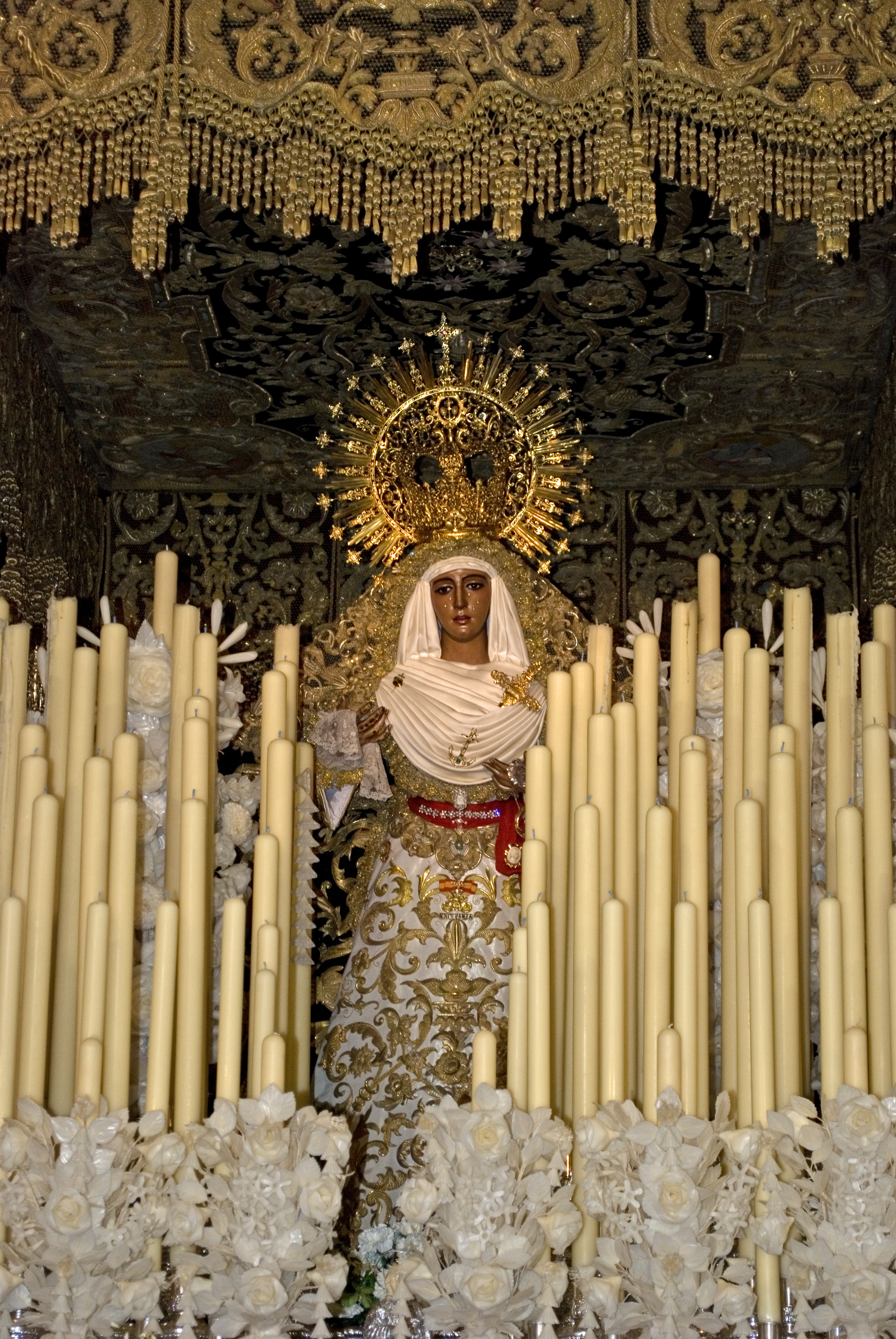 Vista de la Virgen de la Esperanza de Triana (Sevilla), en la capilla de los Marineros, dos días antes de su salida en procesión